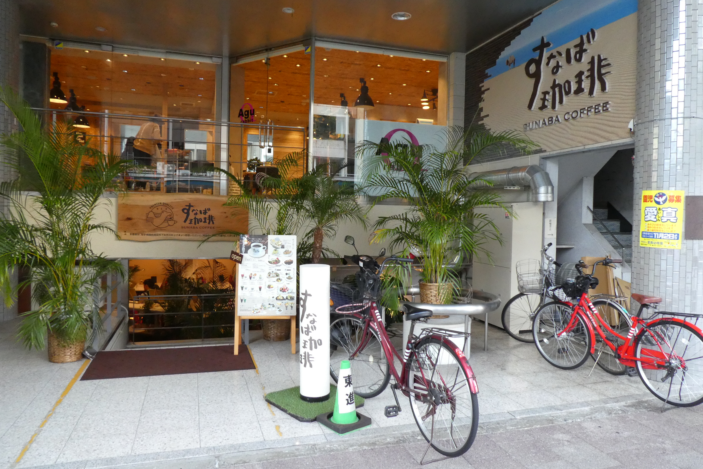 すなば珈琲 “新”鳥取駅前店。